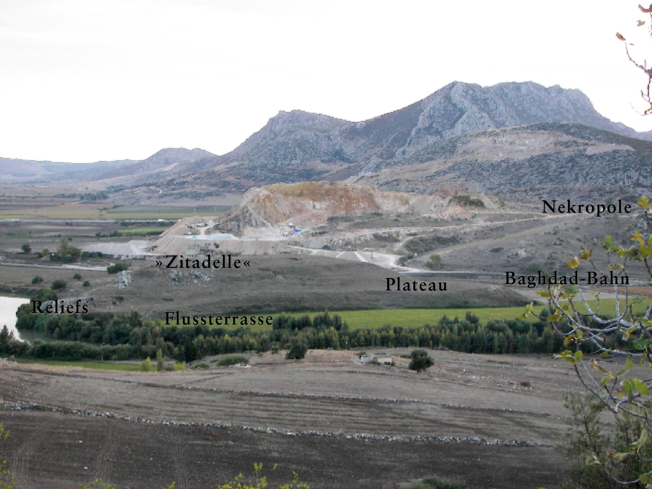 Ansicht des Sirkeli Höyük von Norden